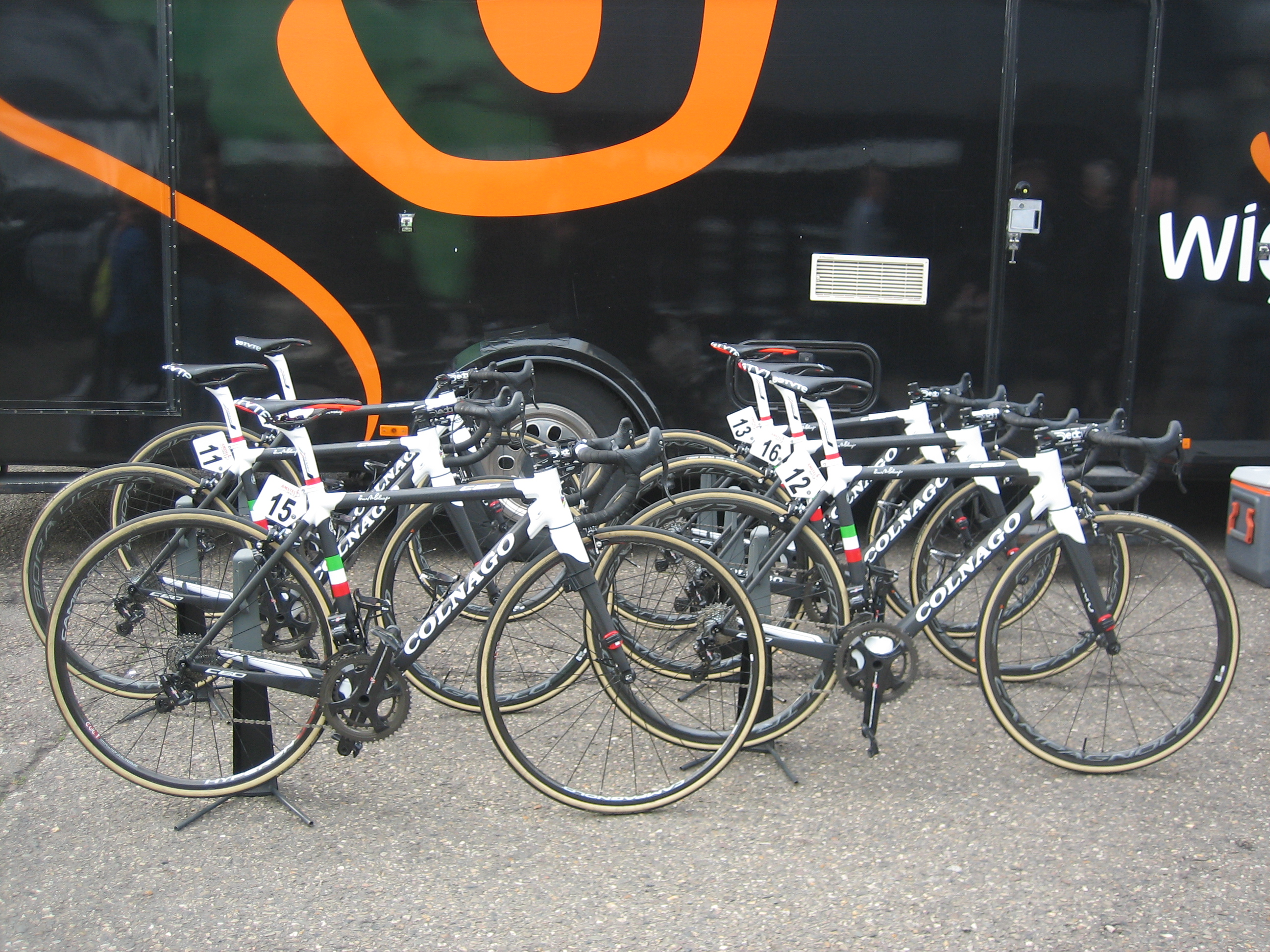 Start van de Amstel Gold Race Ladies Edition 2017 in Maastricht.